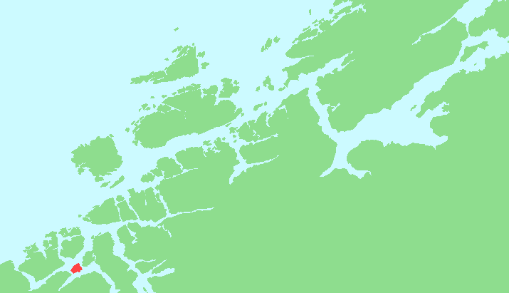 Locator map of Bergsøya, Møre og Romsdal, Norway